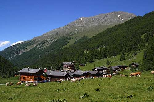 Gruben im Turtmanntal